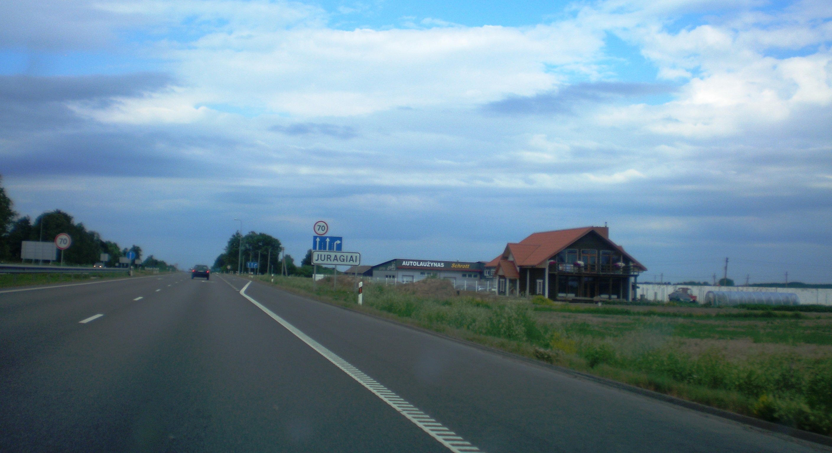 Juragiai, Kauno raj.